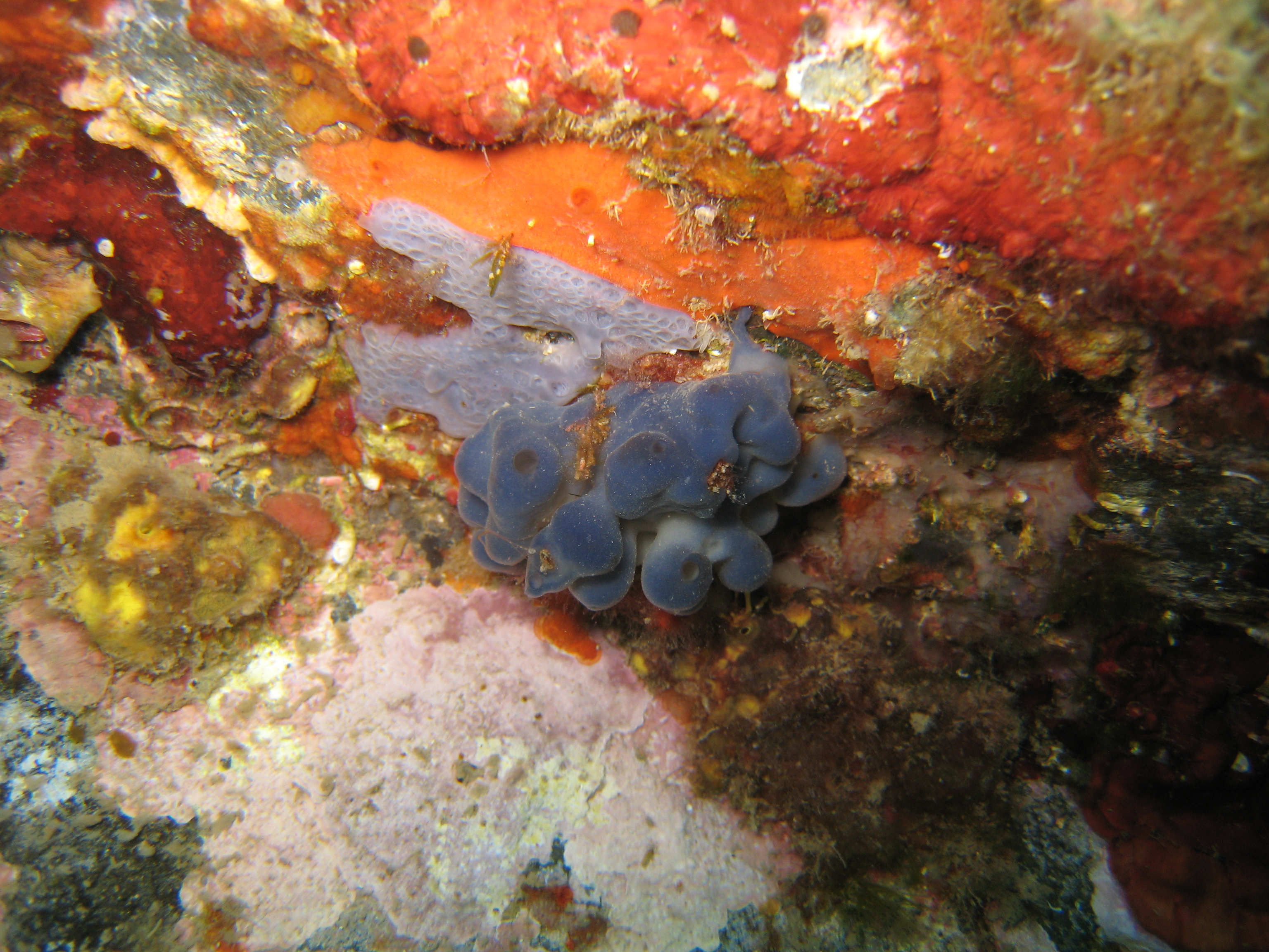 Oscarelle bleu-violet (Oscarella lobularis) & Éponge encroûtante bleuâtre (Phorbas tenacior) en Méditerranée près de Banyuls.